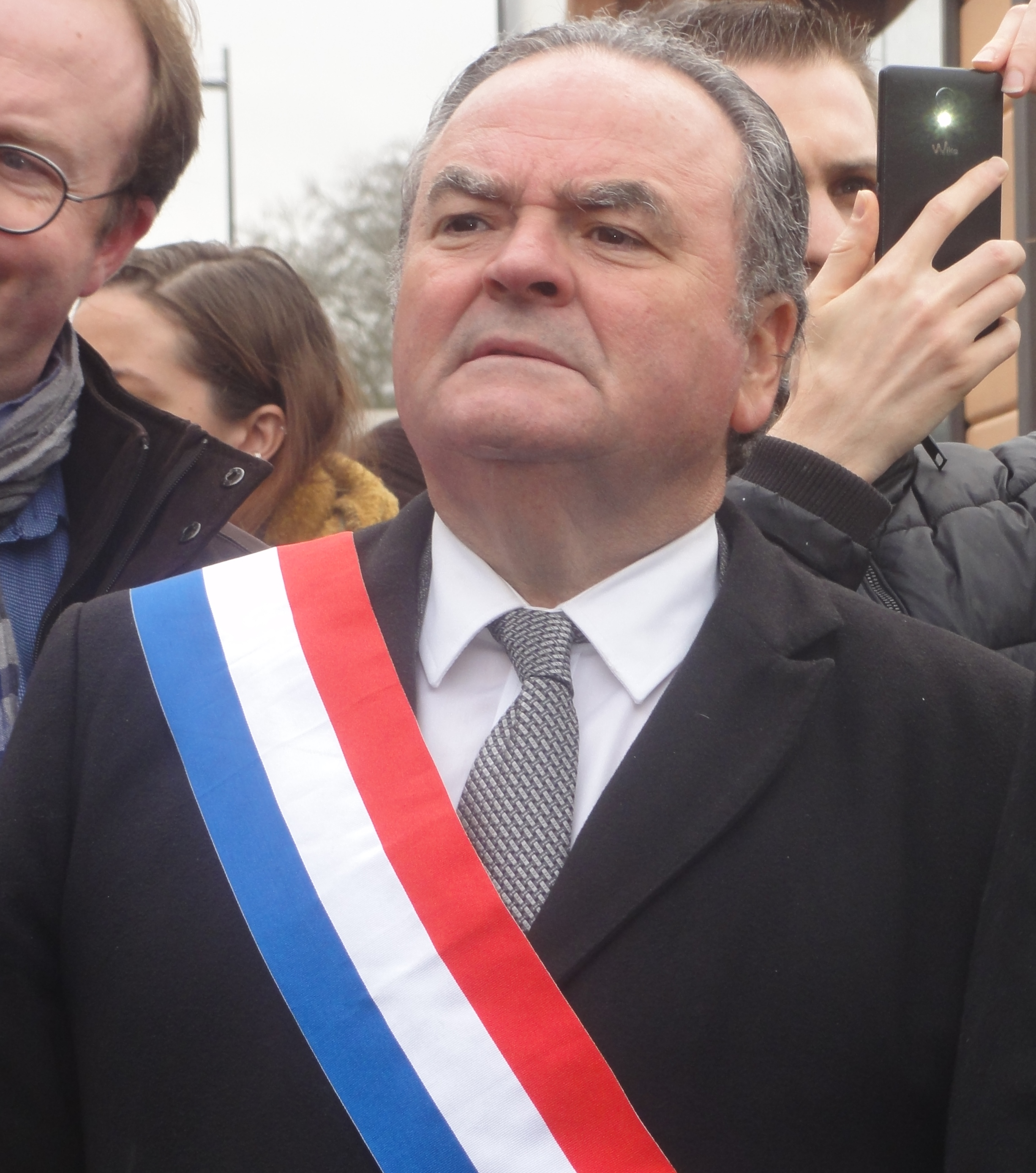 Manifestation contre la suppression des dessertes TGV en gare de Douai le 2 mars 2019. Depicted place: Douai railway station Depicted person: Olivier Henno – French politician